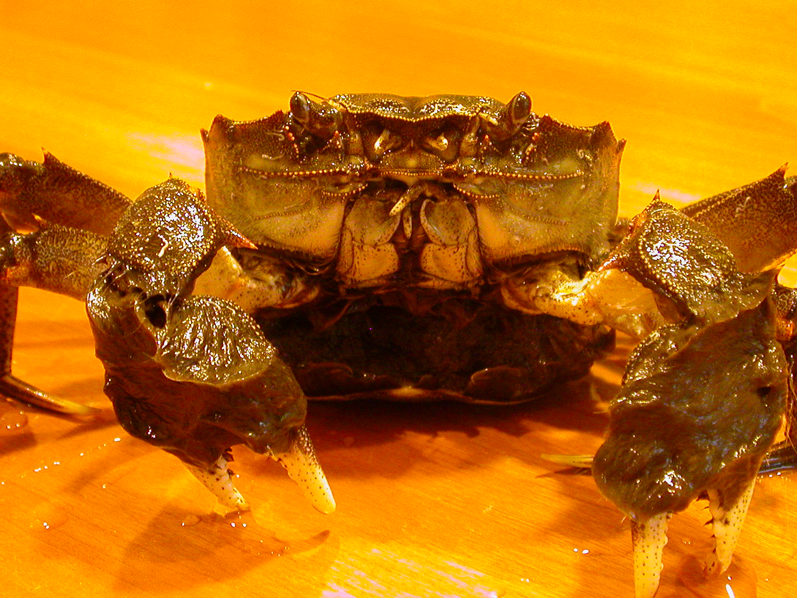 抱卵中のメス。 撮影者: 投稿者に同じ